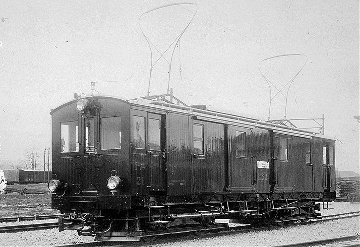 Der fabrikneue Fe 4/4 21 der Elektrischen Schmalspurbahn Solothurn–Bern (ESB) in Solothurn